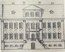 Дом Трезини. Гравюра